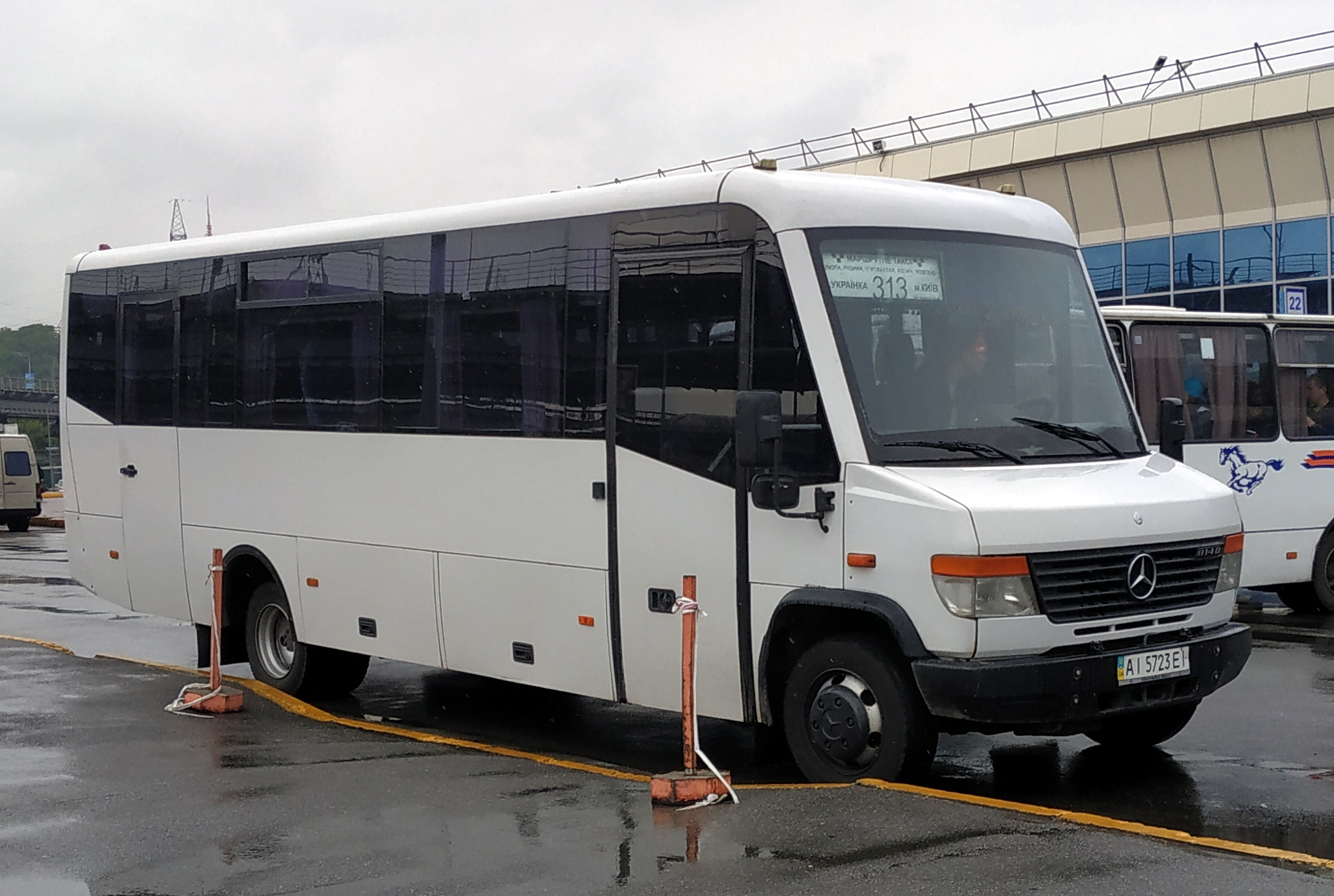 Автобус Стрый-Авто А-07562, Киев, автостанция Выдубичи, 2019 г.